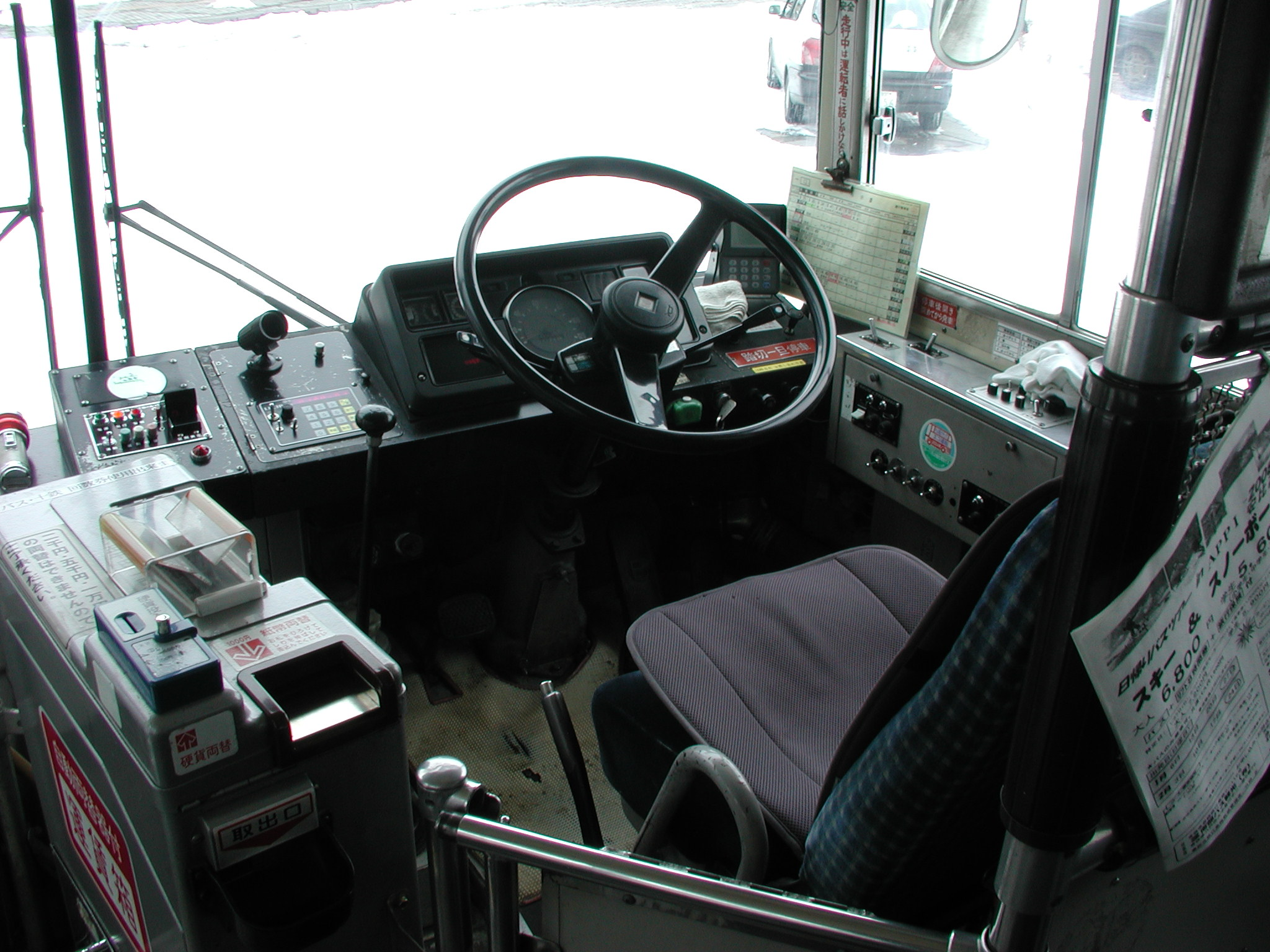 いすゞ・C系：K-CJM500（元：京浜急行電鉄→現所有者：南部バス）：運転席